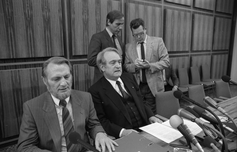 23.9.1986 Pressekonferenz des NRW-Ministerpräsidenten der SPD, Johannes Rau, zu seinem Regierungsprogramm im Falle eines Wahlsieges der SPD bei der Bundestagswahl im Januar 1987- Im Saal der Bundespressekonferenz.